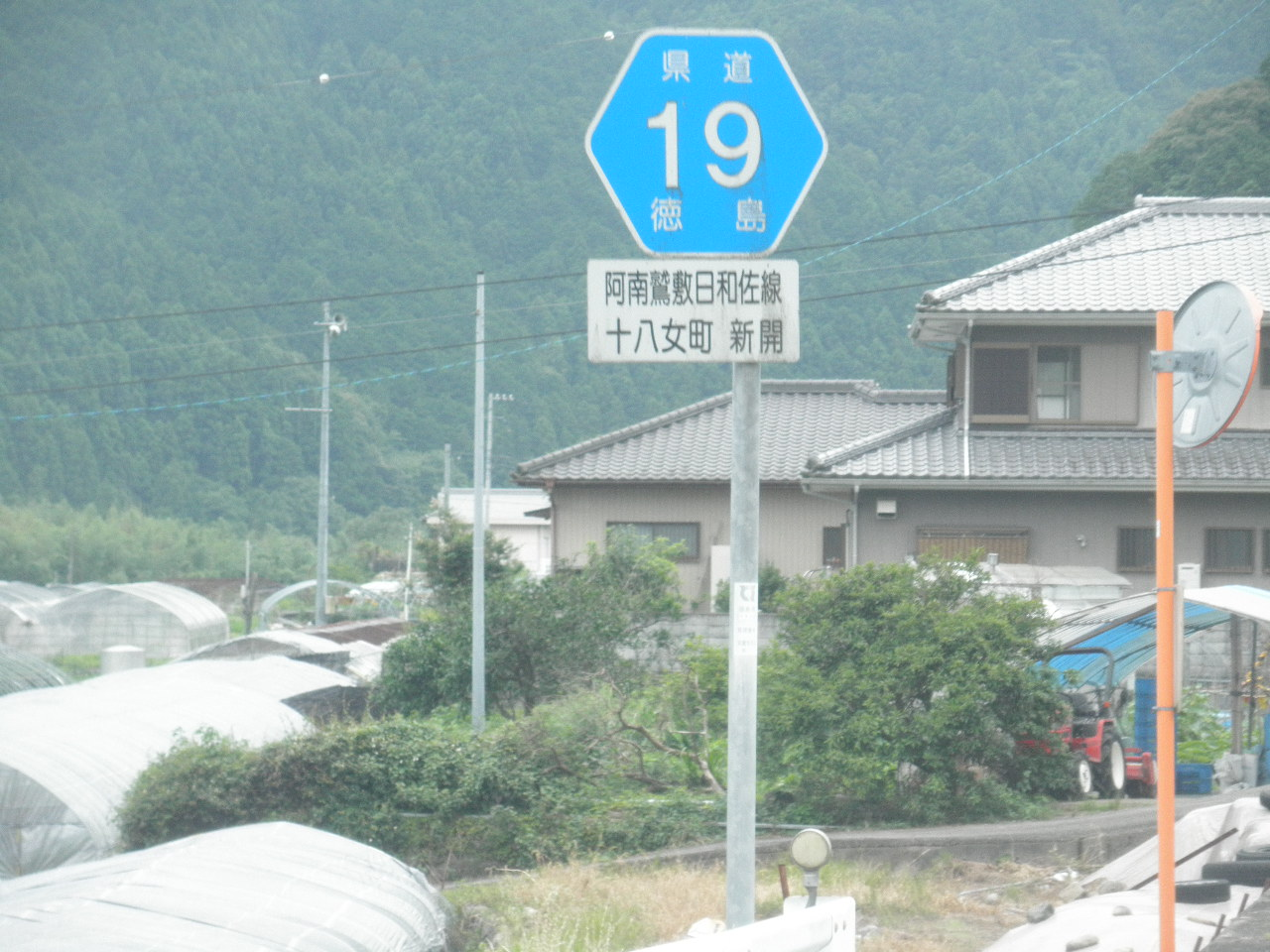 徳島県阿南市十八女町新開 徳島県道19号阿南鷲敷日和佐線